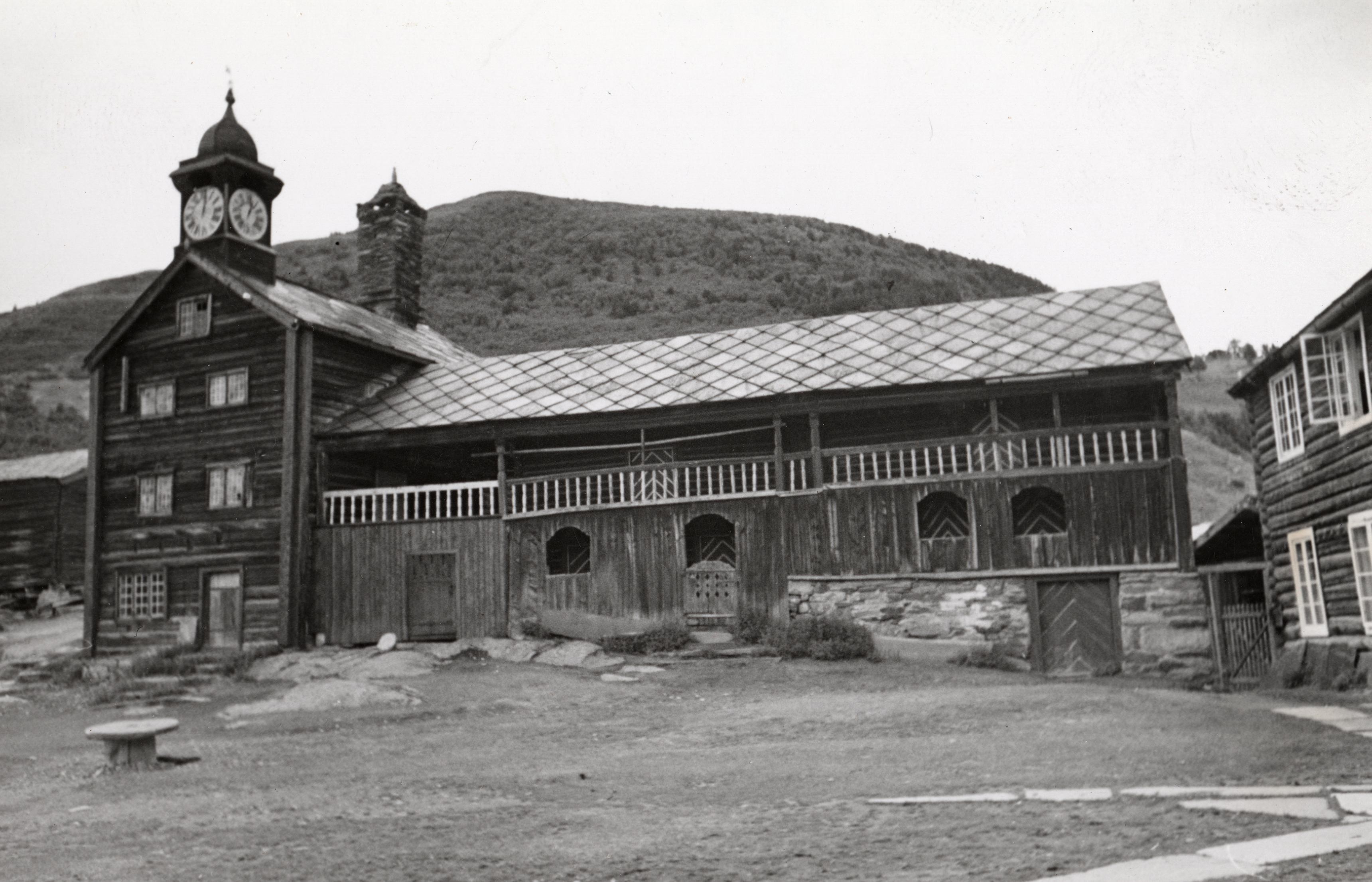 Tofte gård i Dovre, Oppland This image on crowdsourcing geotagging platform Fotodugnad